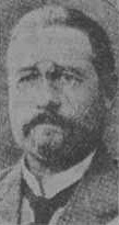 Byggnadsingenjören Gottfrid Ljunggren